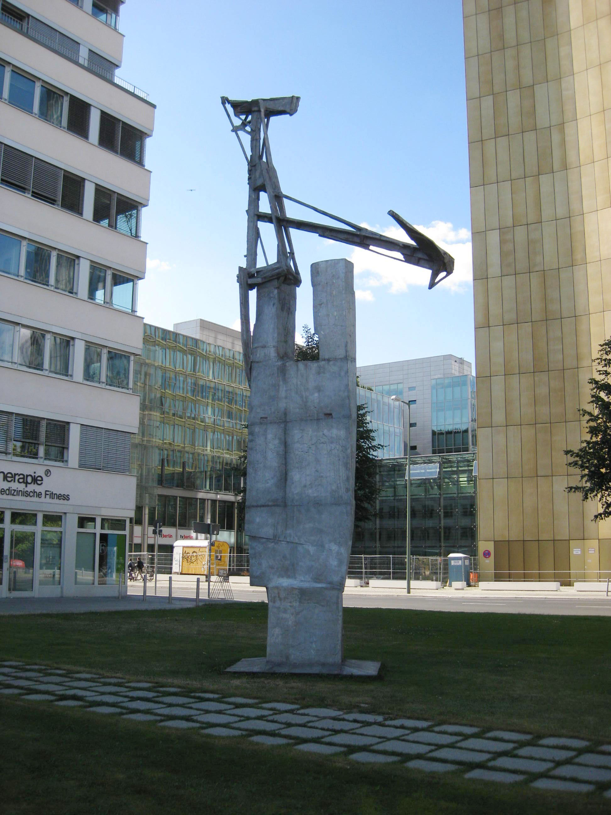 Pomona Zipser,o. T., 1999, Lindenstr./Ecke Rudi-Dutschke-Straße